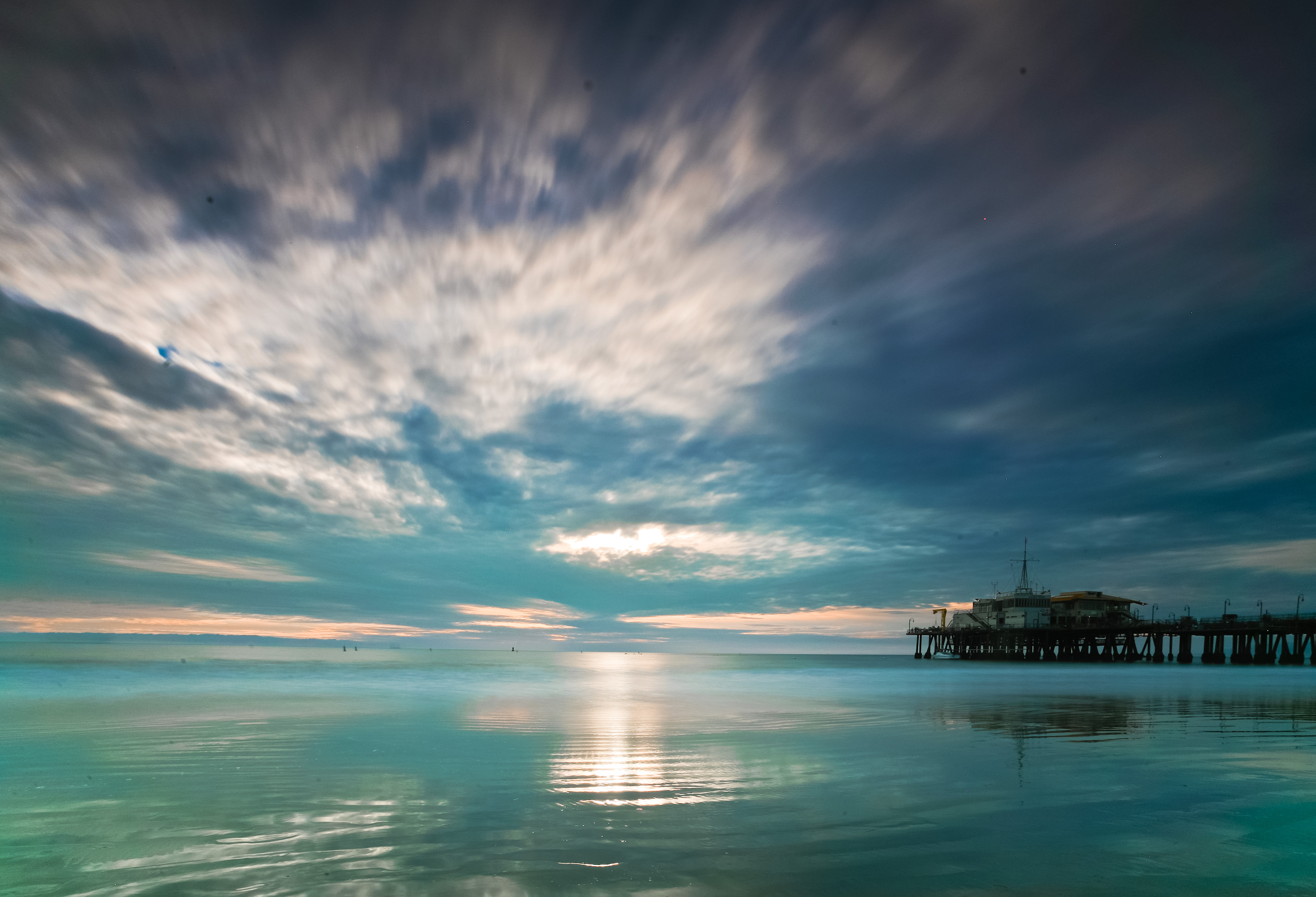 Santa Monica Bay and Pier, at dusk - sunset. canon 5d 17-40 hoya ND 400X 0.9 GND